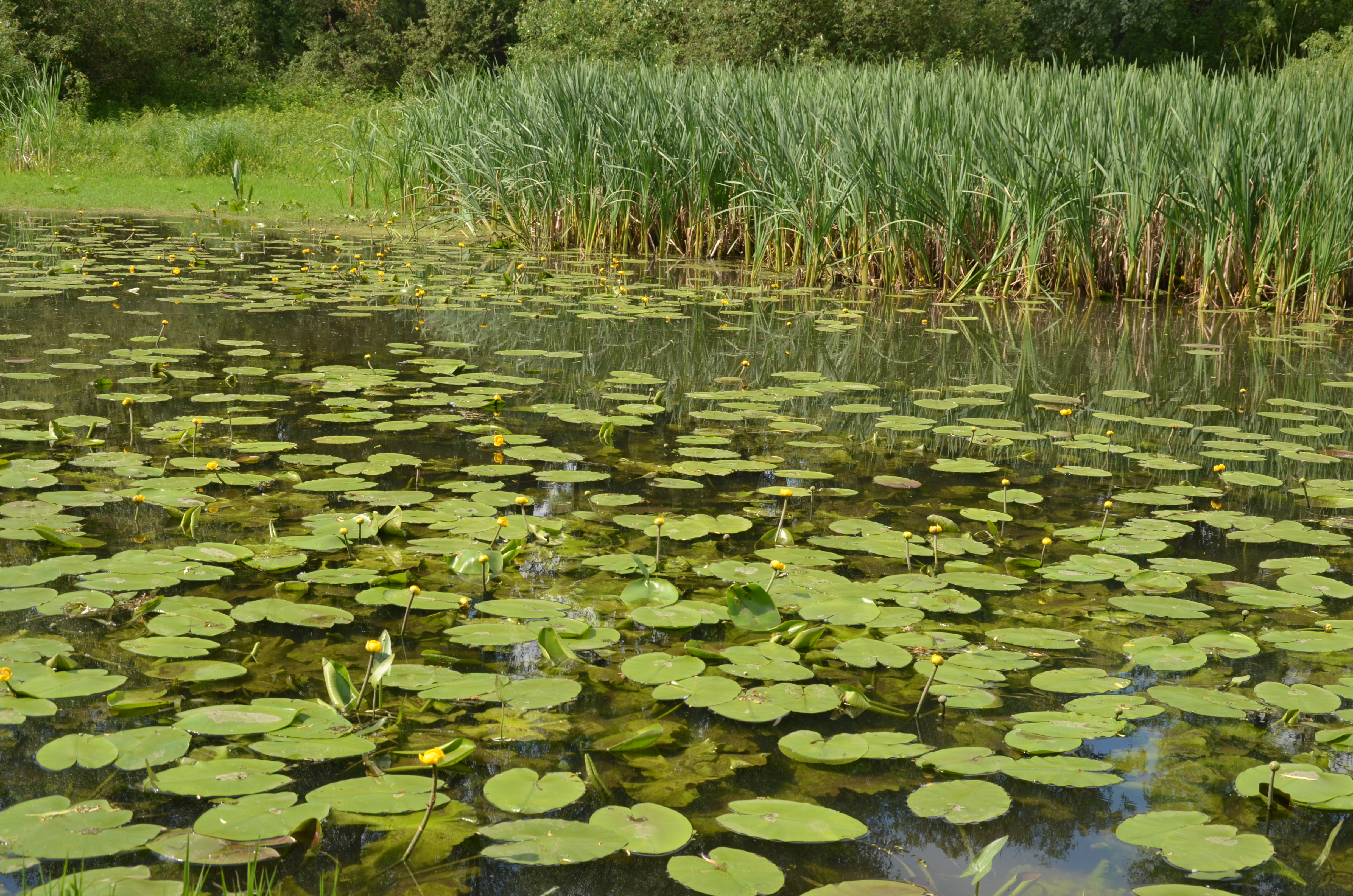 Зачарована Десна, Вишгородський район та Броварський район